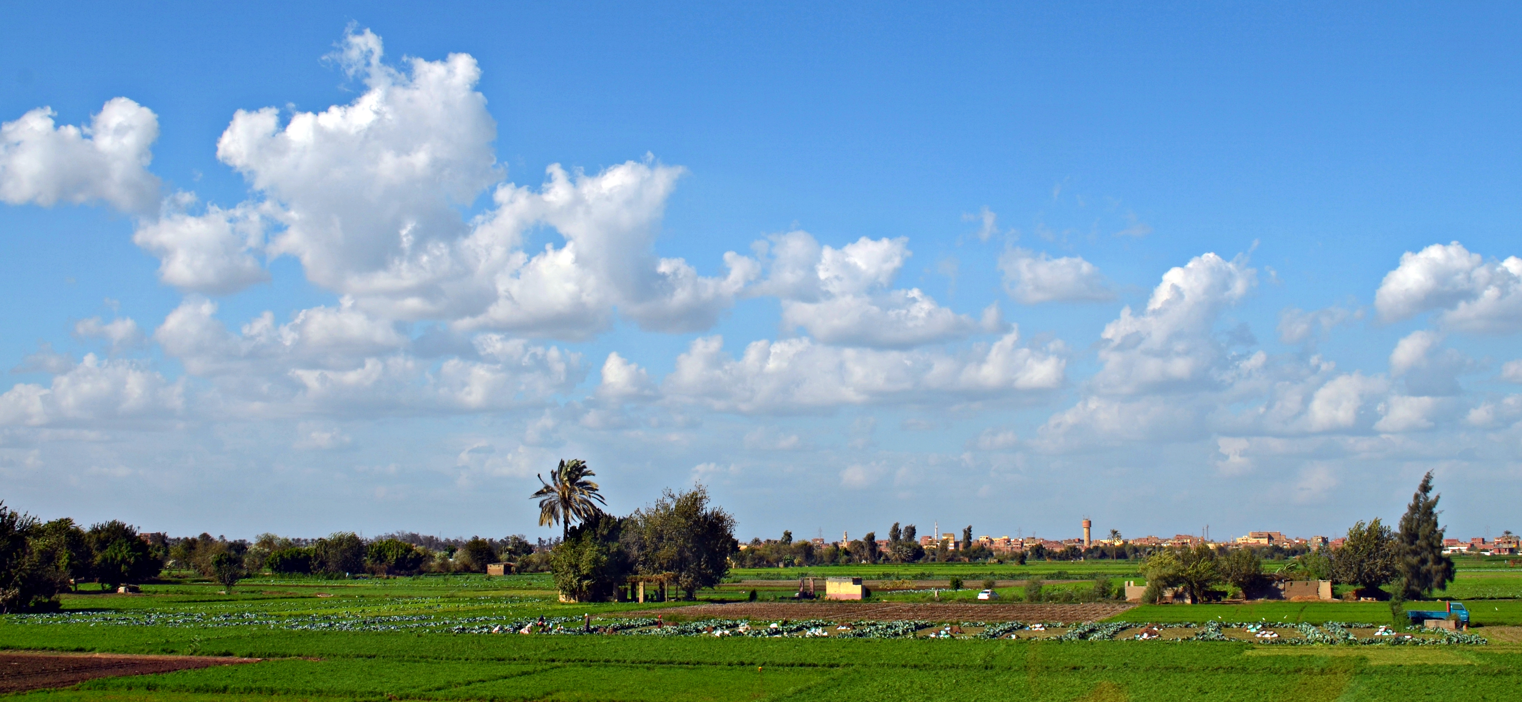 الريف في قرية ناهيا، محافظة الجيزة، مصر